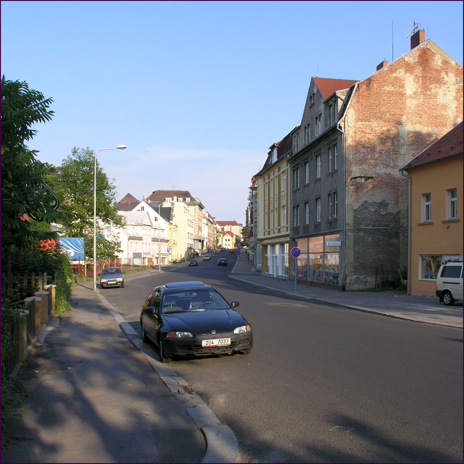 Rumburk 1 - Třída 9. května